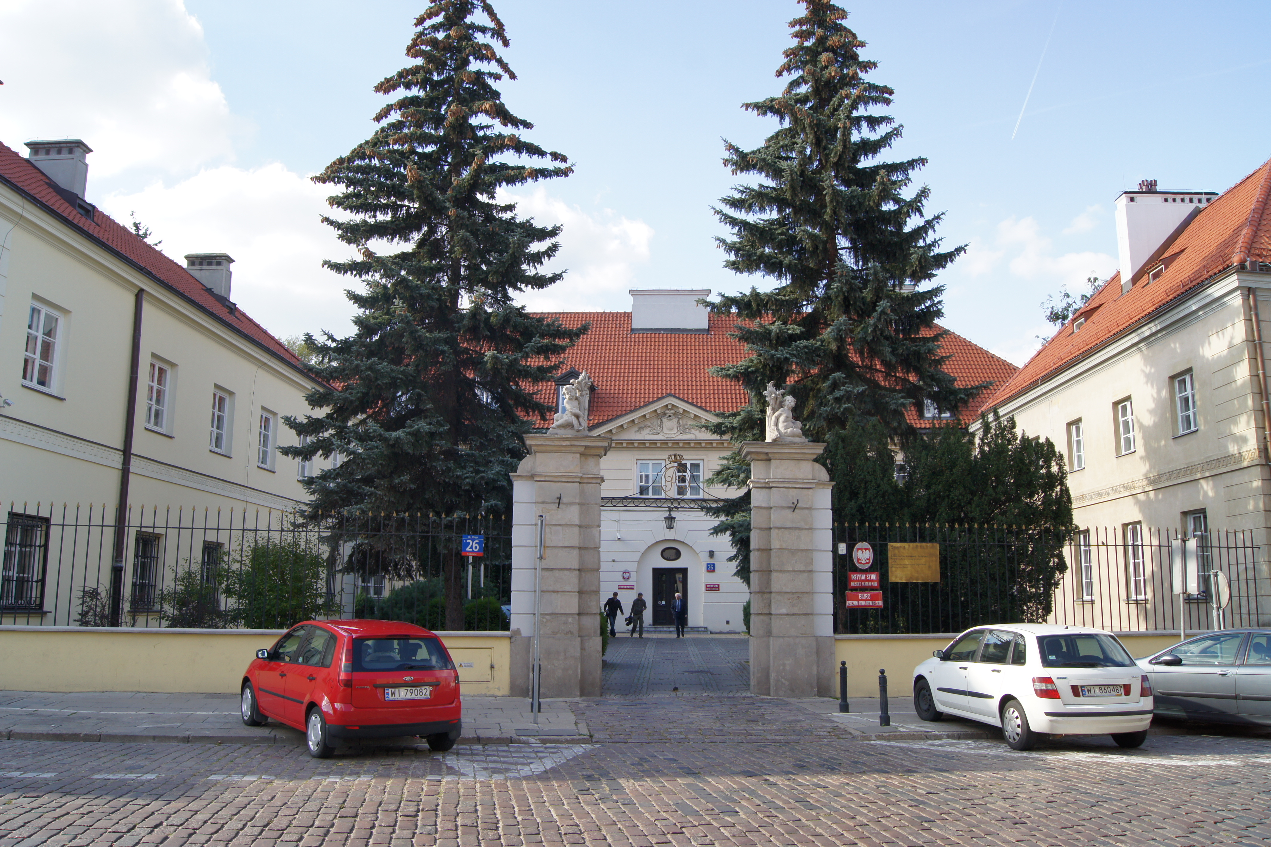 pałac Radziwiłłowej, ul. Długa 26, Warszawa, dz. Śródmieście